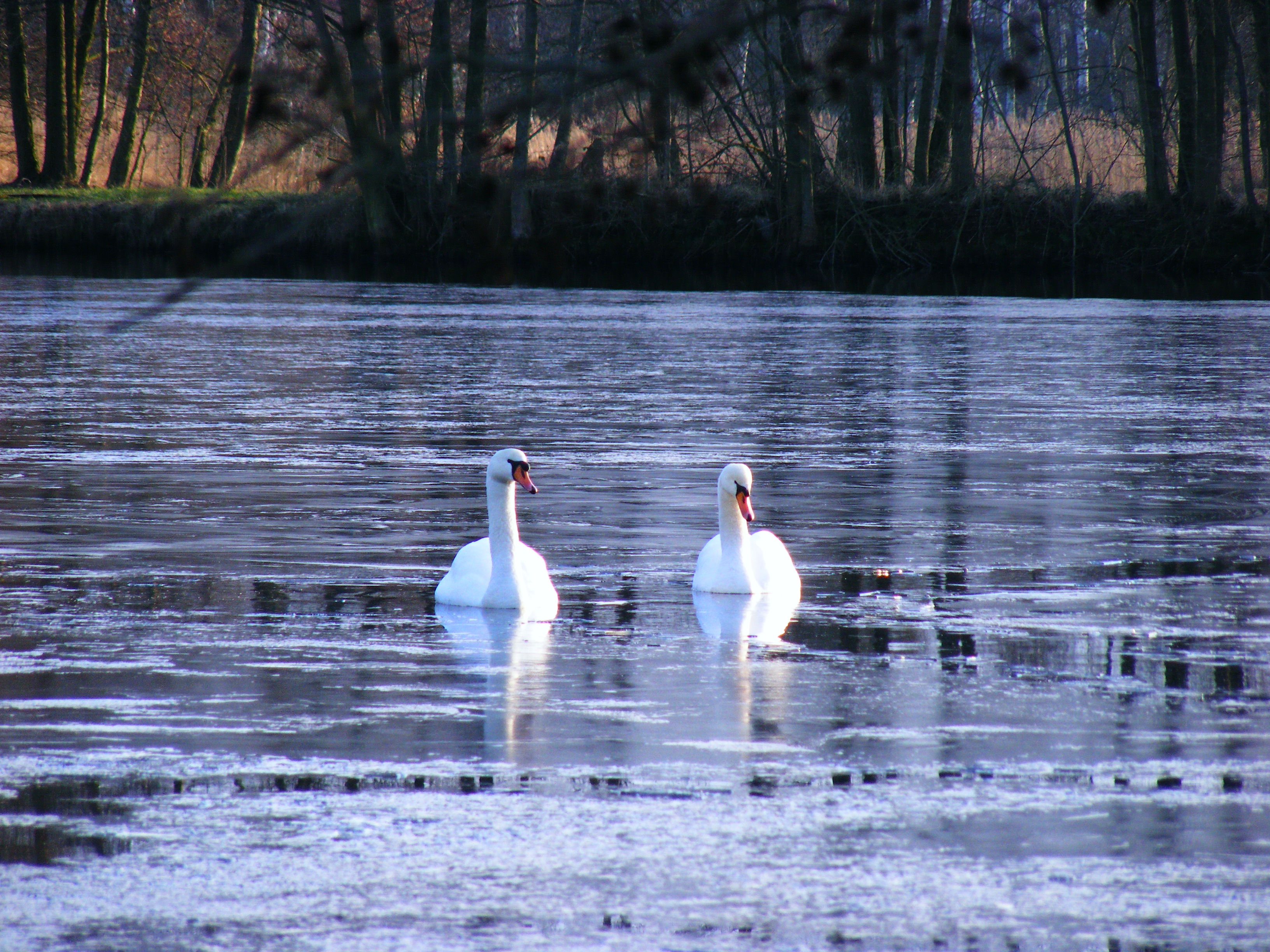 Eisbrecher